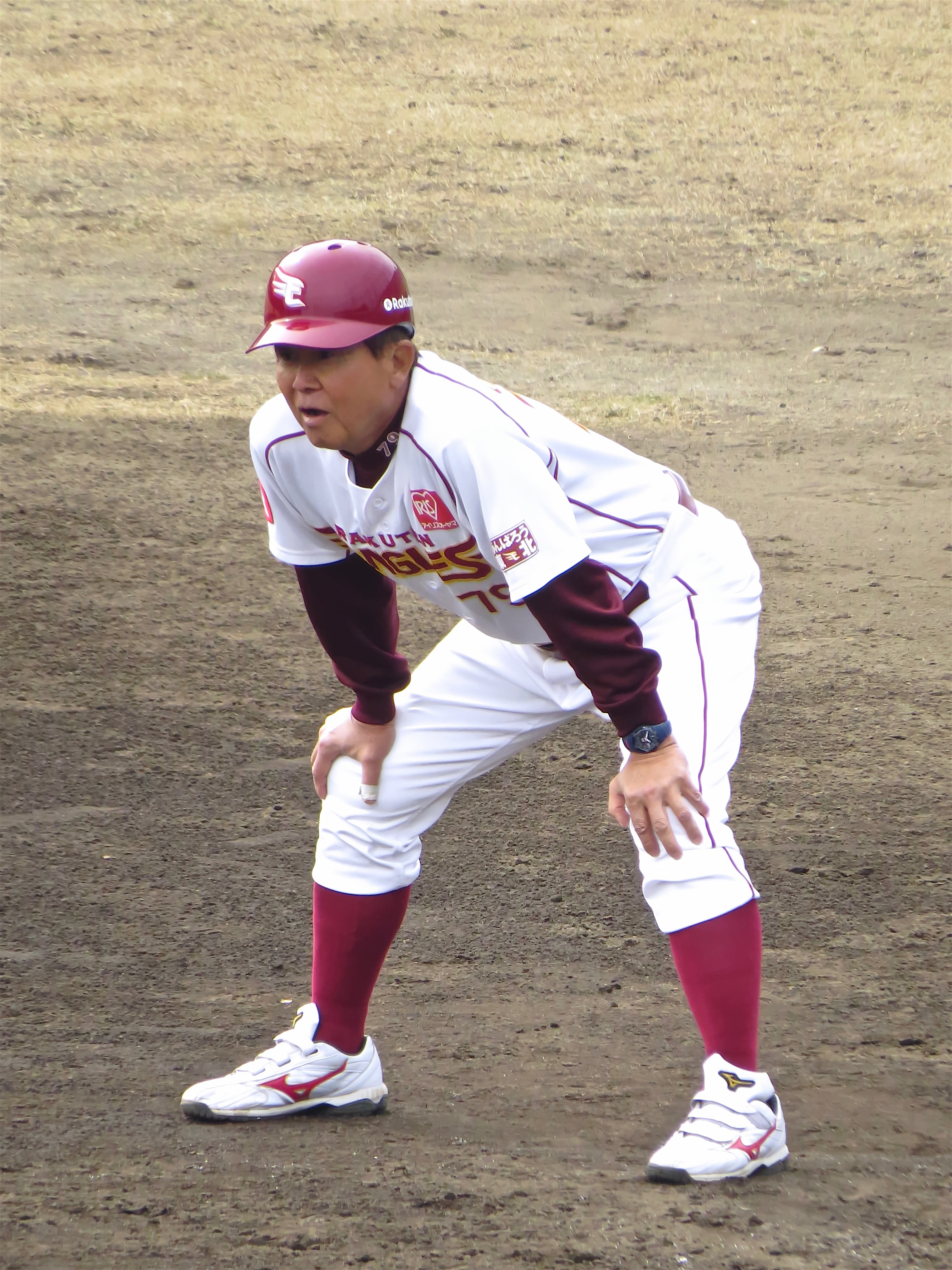 さいたま市営浦和球場にて